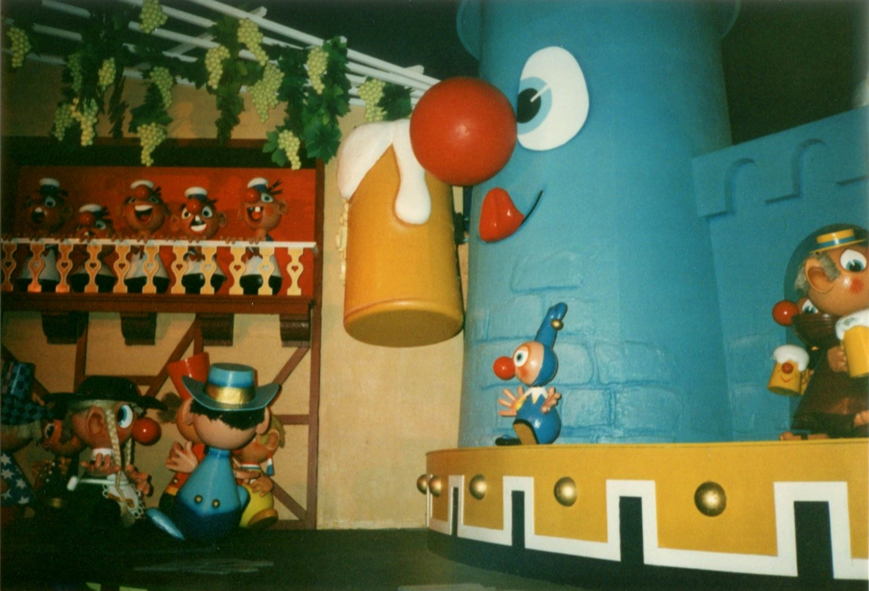 EftelingCarnavalGermany